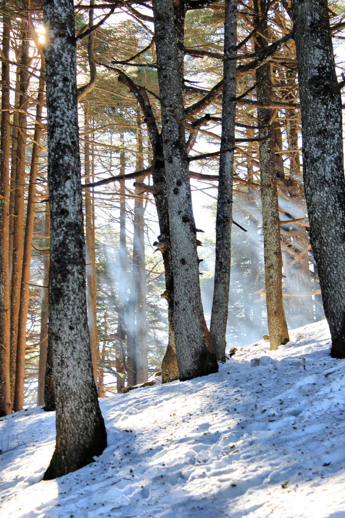 le scédre Atlassien a Chriaa. Bblida